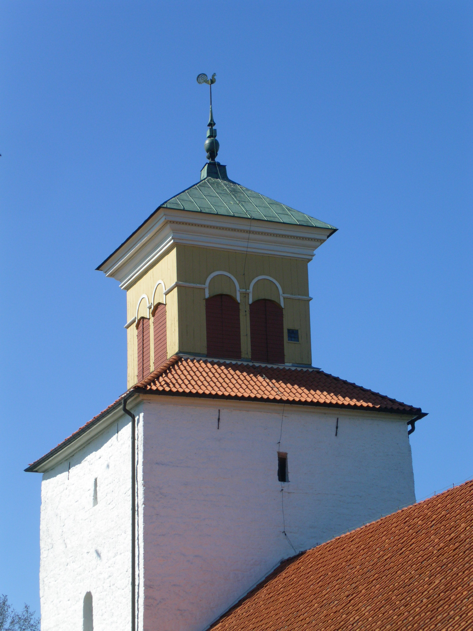 Löts kyrka, tornet